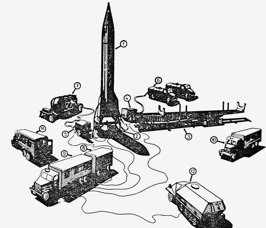 reprodukcia fotografie: schéma palebného postavenia rakiet na kvapalinový pohon